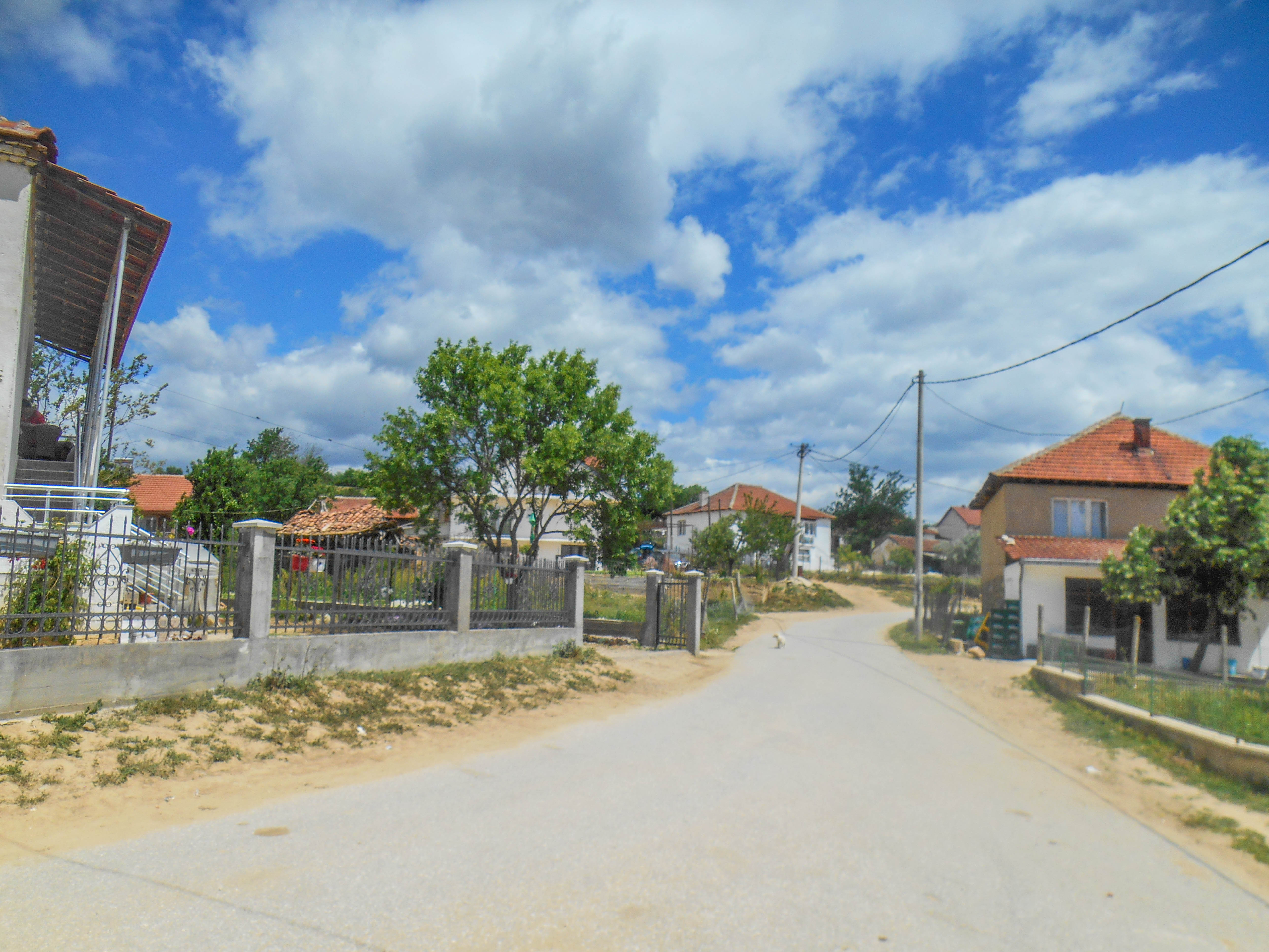 Едрениково